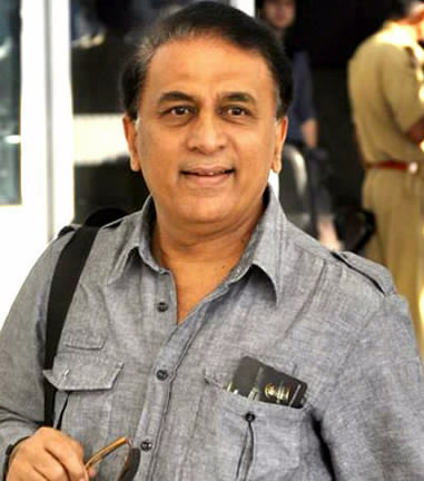 Sunil Gavaskar at Mumbai airport after arriving from Kolkata